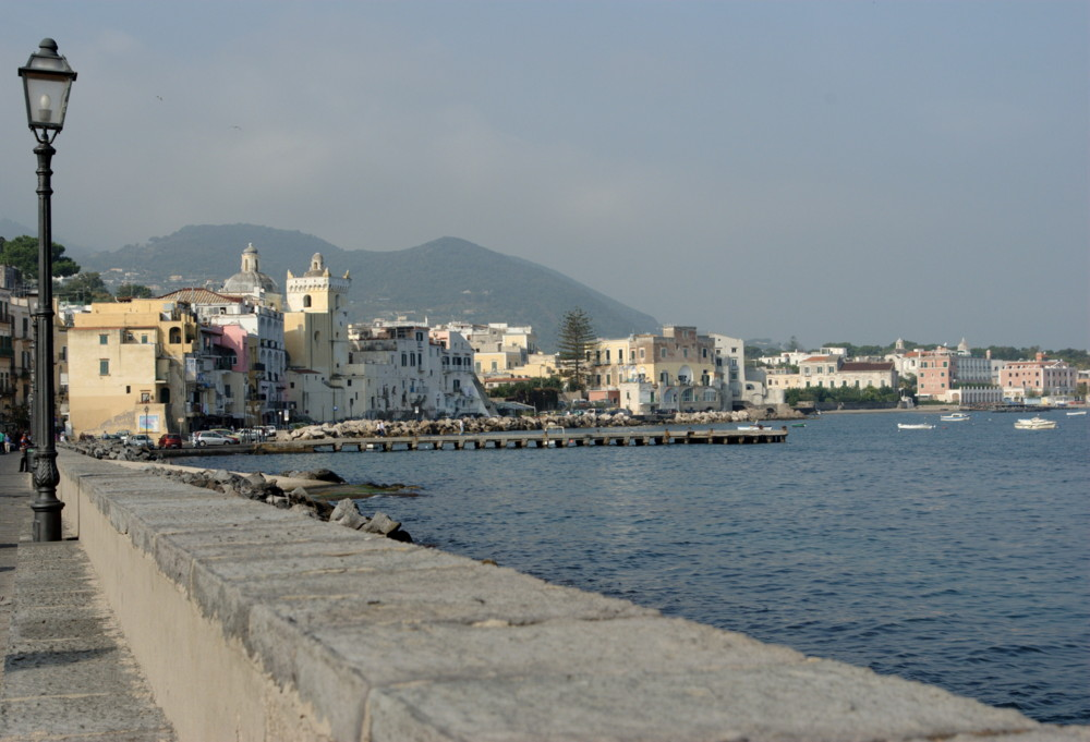 Ischia, veduta della frazione di Ischia Ponte dal ponte del Castello Aragonese. Autrice foto: Chiara Trani